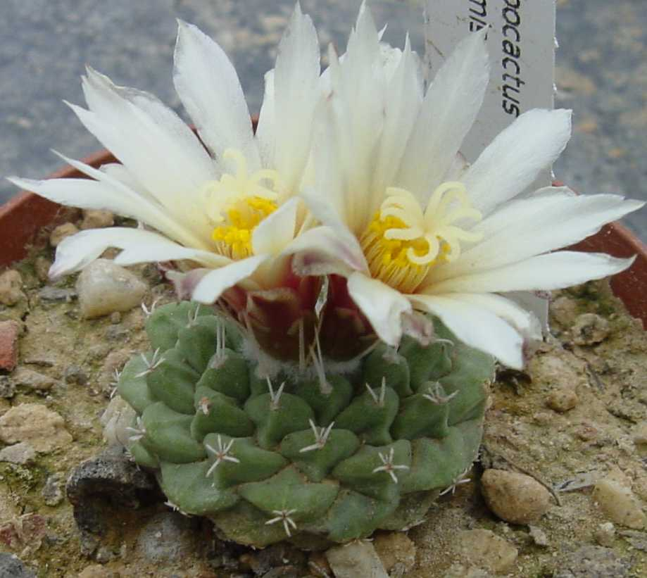 blühender Strombocactus disciformis